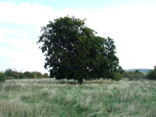 Keleti bükk Lókút határában, Veszprém megye